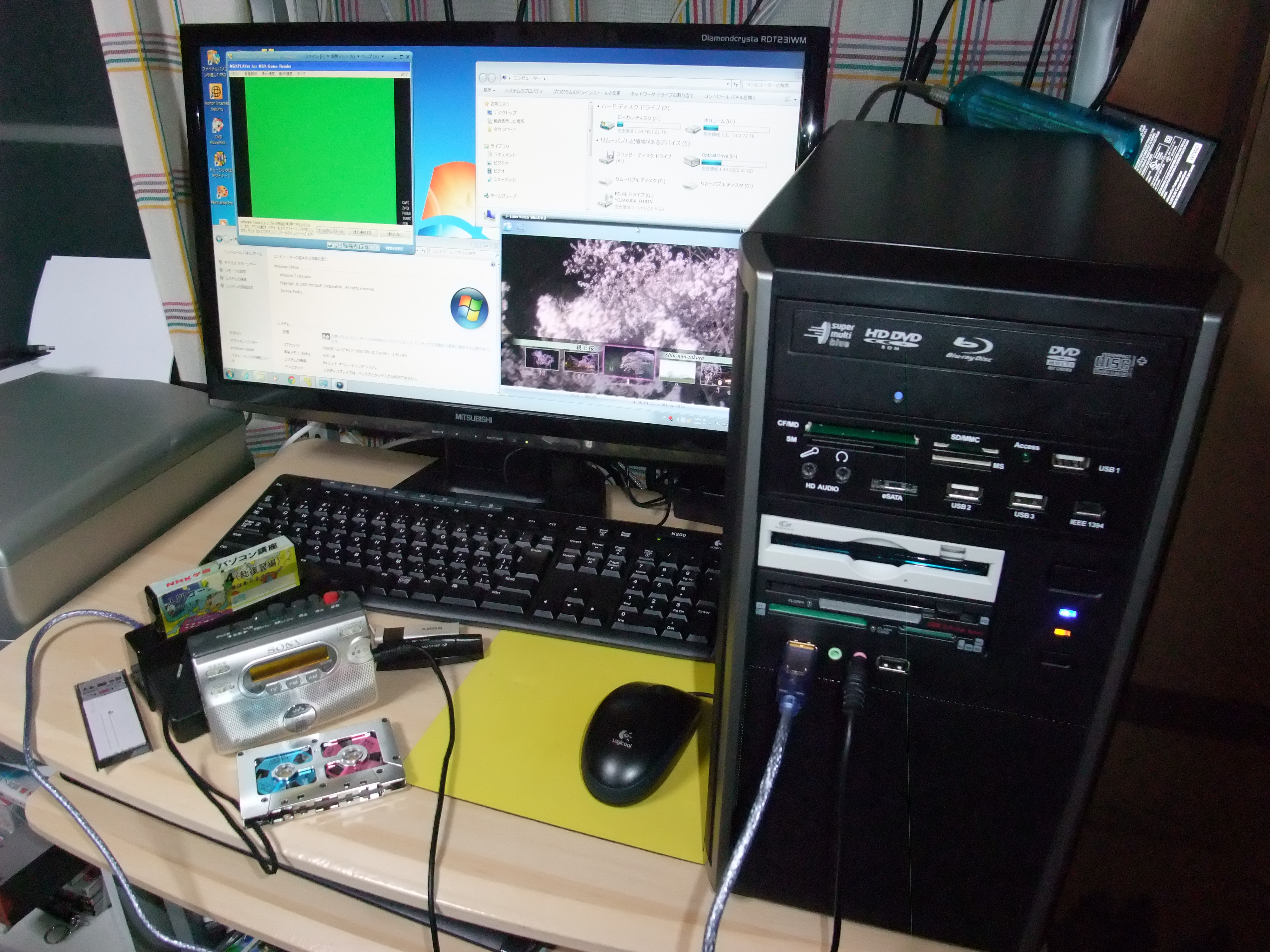 フロッピー、MO、HD DVDなど既に死滅したメディアの再生可能なWINDOWS7パソコン